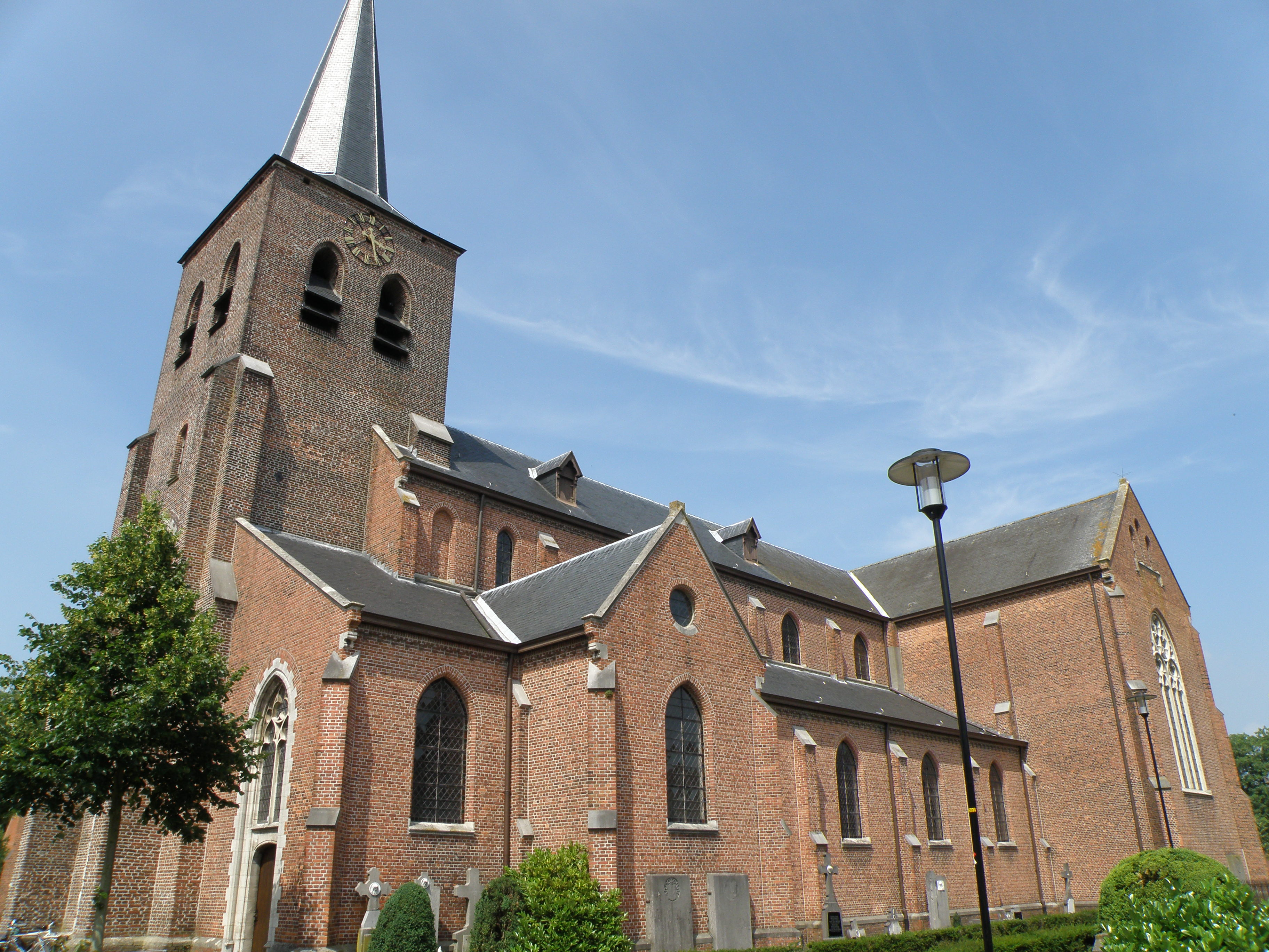 Vosselaar, nabij Turnhout, prov. Antwerpen, België. Onze-Lieve-Vrouwkerk met neogotisch schip (af 1886, n.o.v. arch. Taeymans) en laatgotische westertoren (16e eeuw).